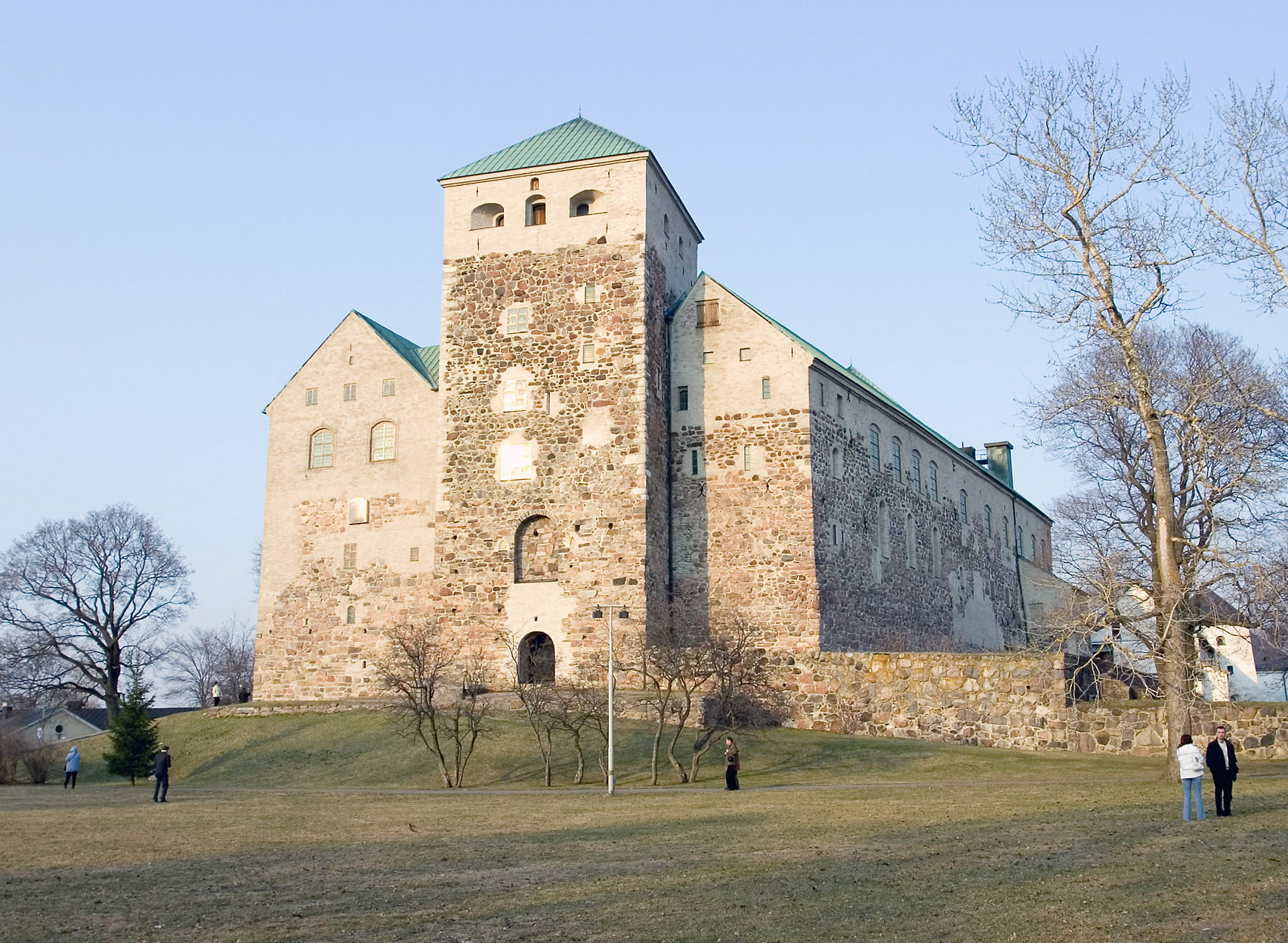 The Turku Castle / Turku, Finland